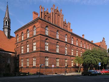 Wyższe Seminarium Duchowne we Włocławku